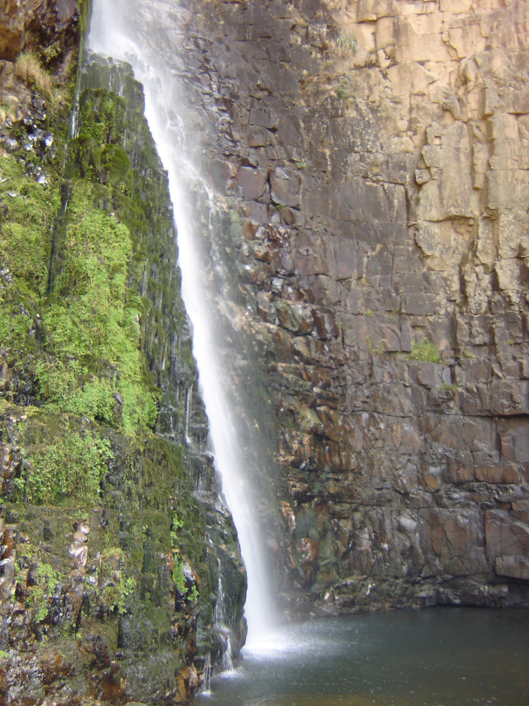 Runa Simi: Turu Warkhu phaqcha, Wak'as llaqtamanta tarikun chunka tawayuk km.pi, yaku phaqchamun pachak chunkayuk m. aswan patamanta.